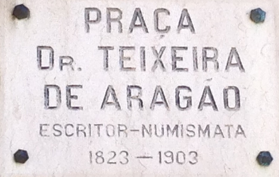 Placa toponímica